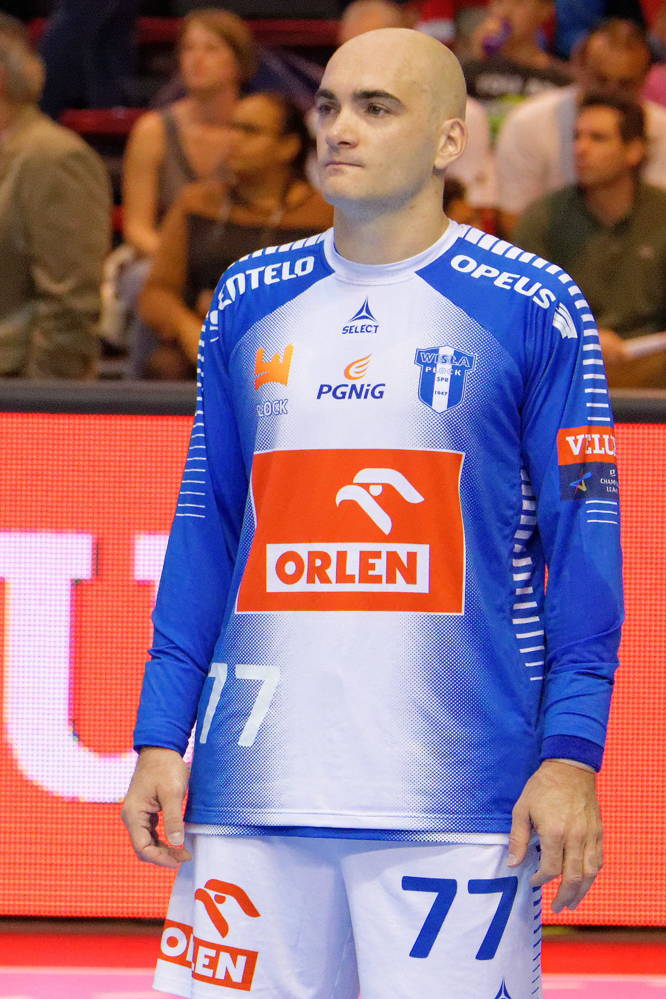 Rencontre de phase de groupe de la ligue des champions 2015-16 entre le PSG et le club polonais de Orlen Wisla Plock. A la Halle Carpentier (Paris), le 27 septembre 2015.